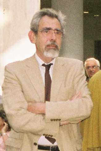 António Barreto, Portuguese sociologist, at Exponor